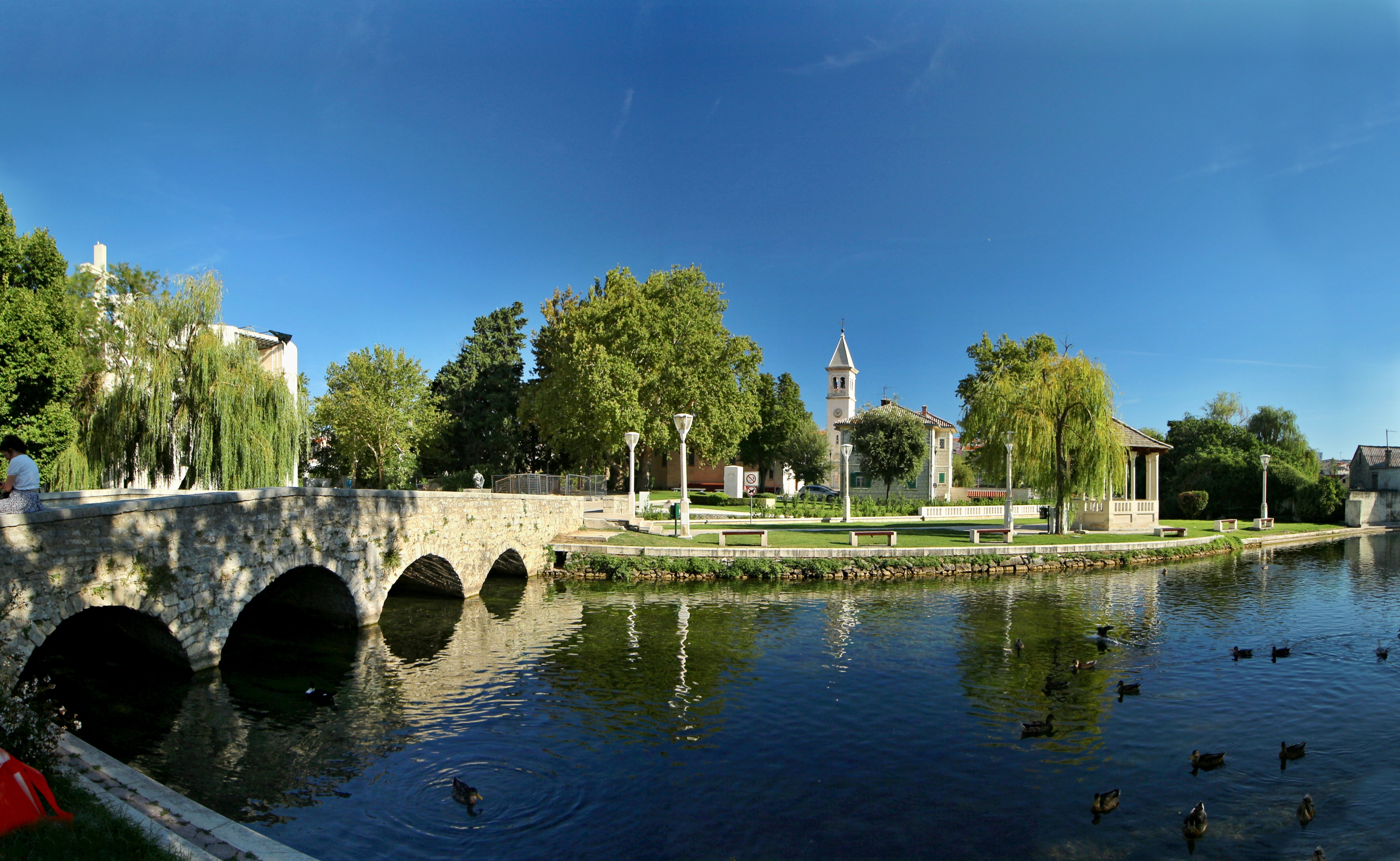 Město Solin u Splitu